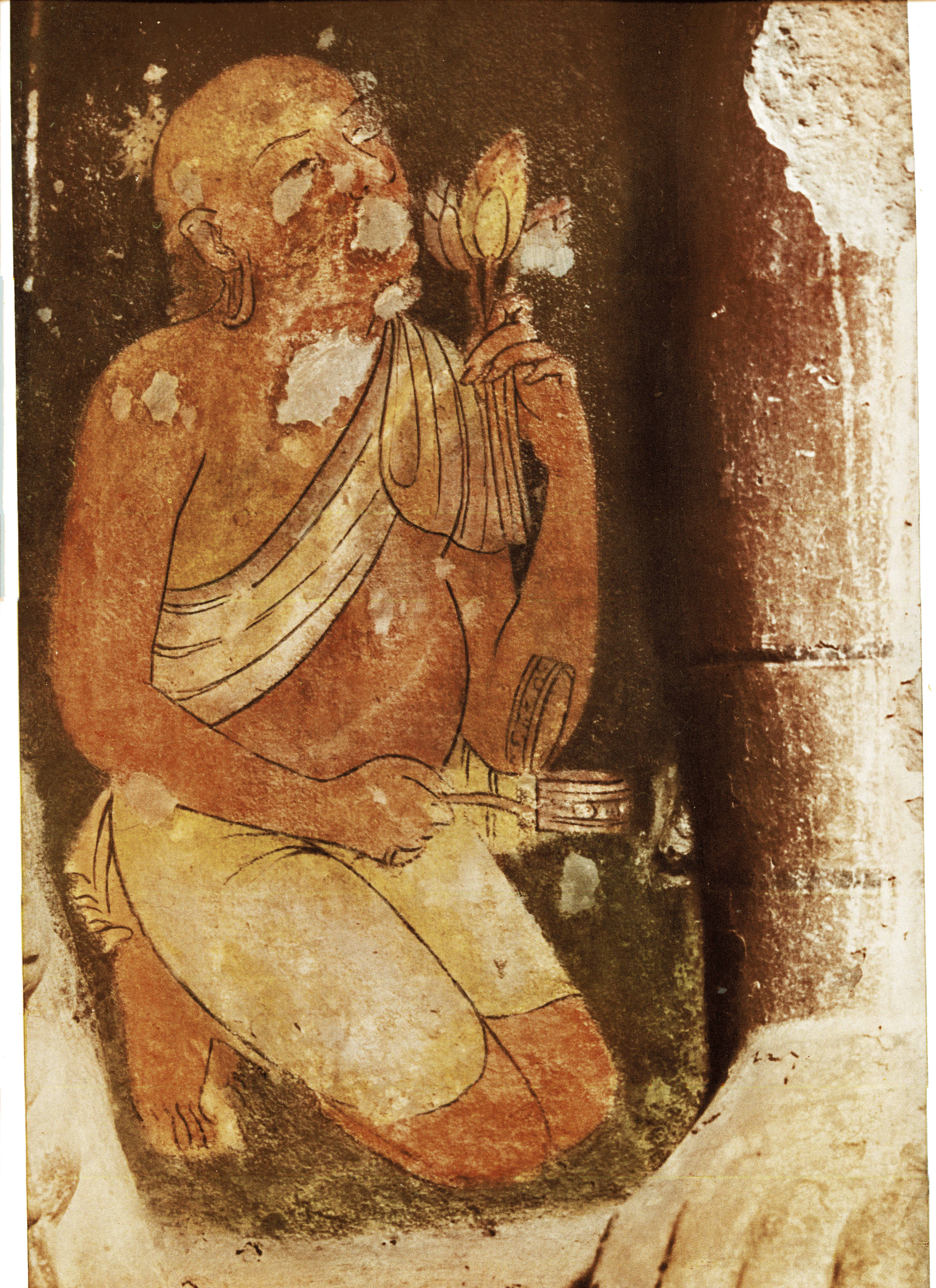 Es zeigt eine Malerei, die einen Mönch darstellt aus der Höhle 6 von Ajanta.